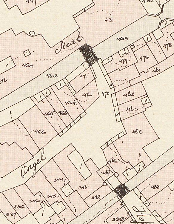 Binnenhof en omgeving Gemeente 's Gravenhage sectie F genaamd 't Hof, opgemeten dd maart 1931 door Landmeter van het Kadaster